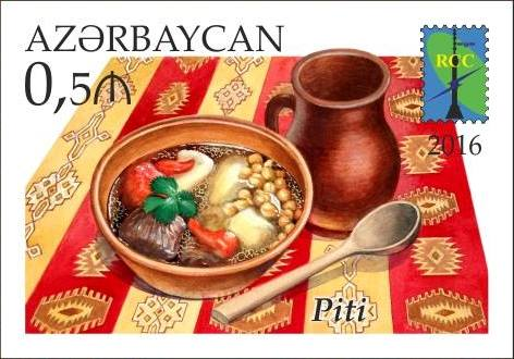 National cuisine. N 1284 - 50 qapik – There are pictured the national dishes “Piti” on the stamps.